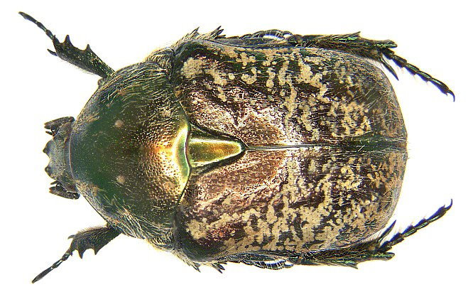 Familie: Scarabaeidae Grösse: 16,5-22 mm Fundort: Kasachstan, Dshambul leg. Lukthanov, 1993; det. U.Schmidt Foto: U.Schmidt, 2005